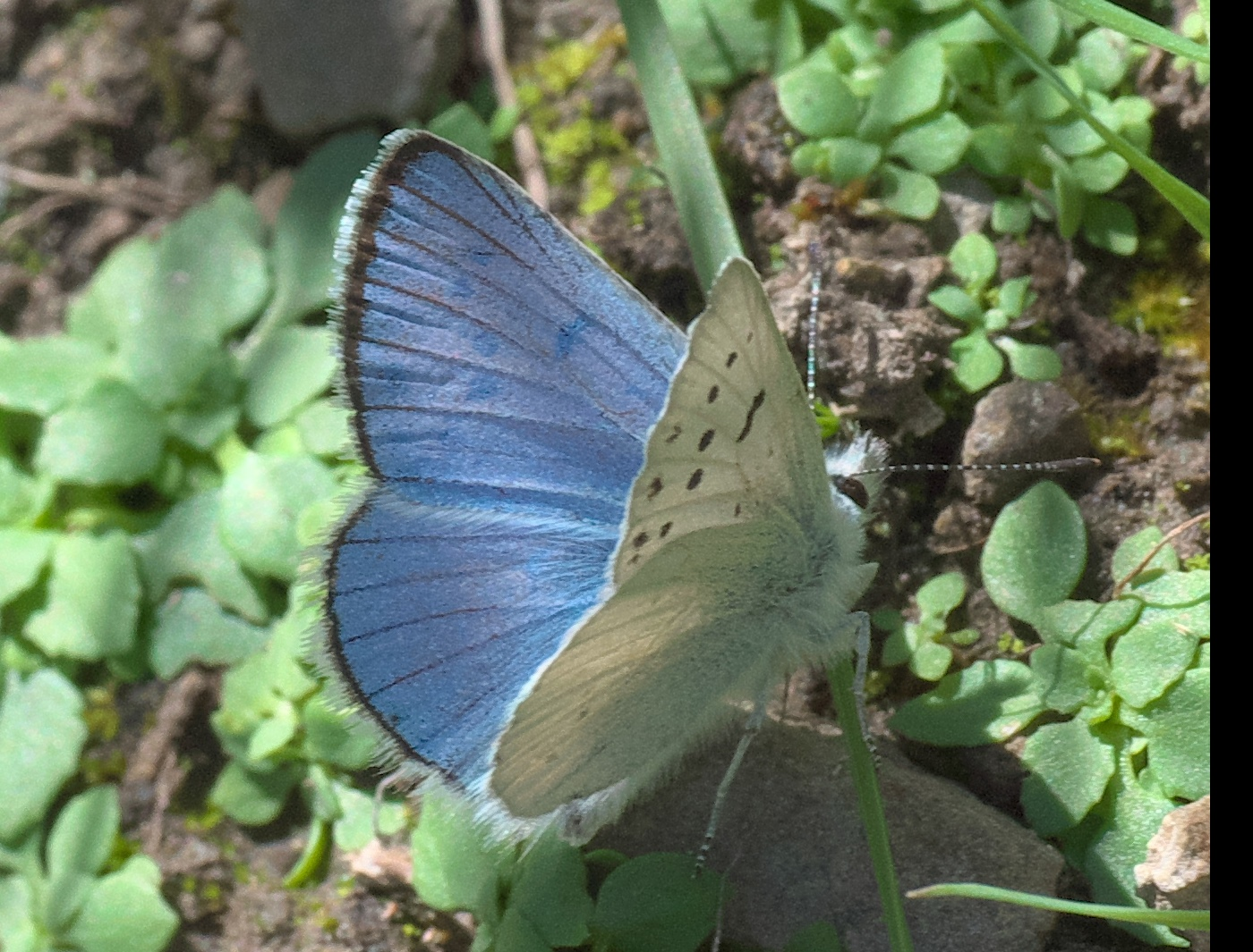 Lycaena heteronea, blue copper, ID Confidence: 98